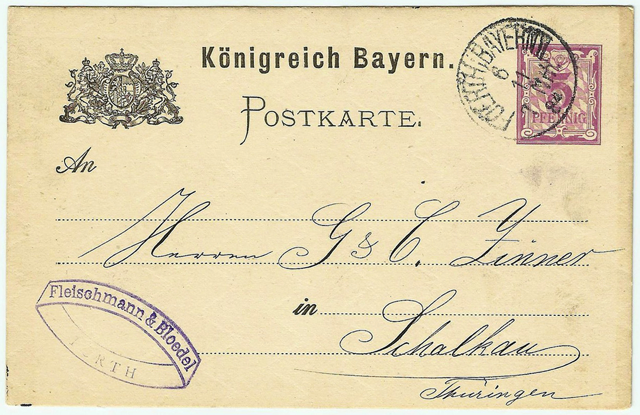 Postkarten-Vordruck vom Königreich Bayern mit blauem Stempel und Schreiben des Puppenherstellers Fleischmann & Bloedel an G & C Zinner in Schalkau in Thüringen ...